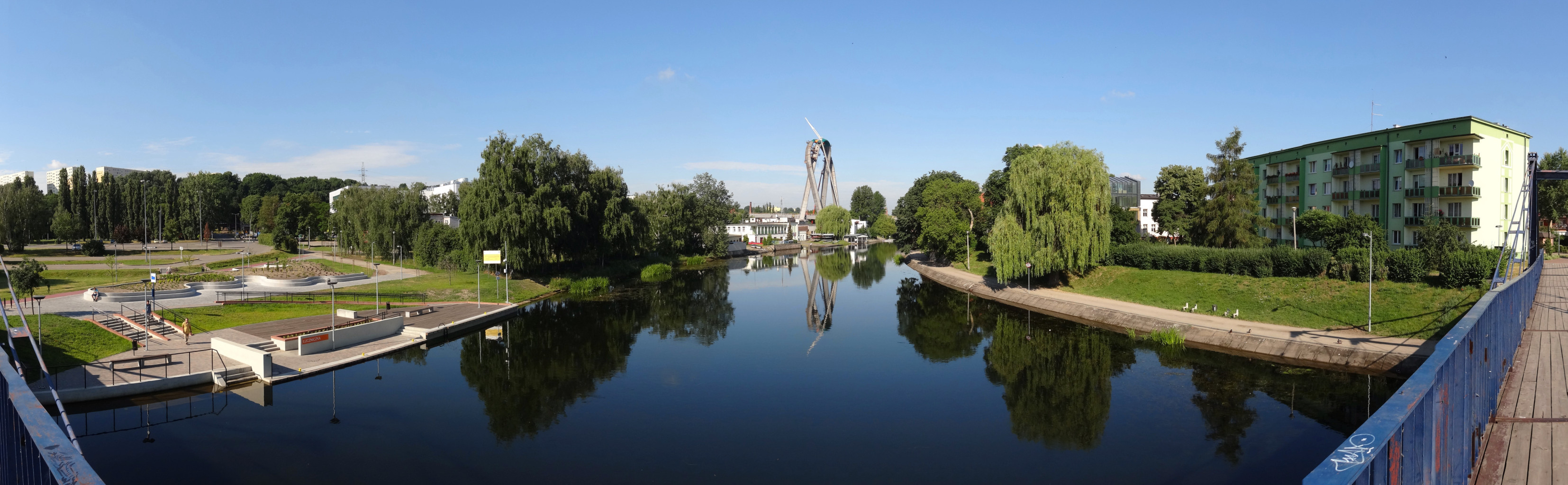 Brda w Bydgoszczy w rejonie hali Łuczniczka i kładki Esperanto